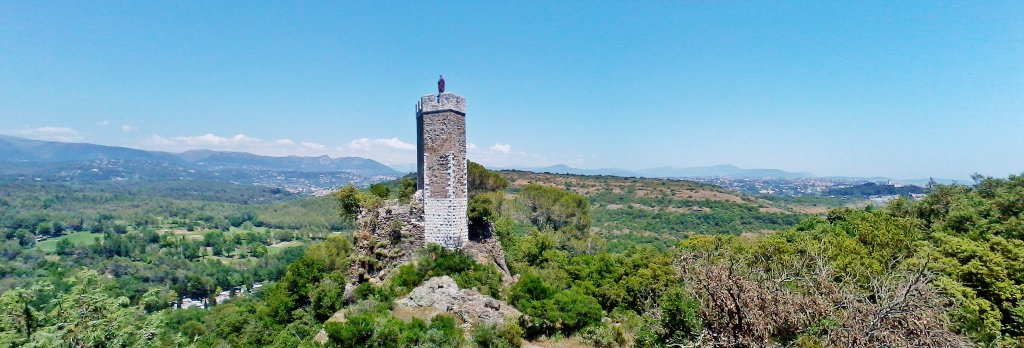 La Tour de la Madone, Villeneuve-Loubet